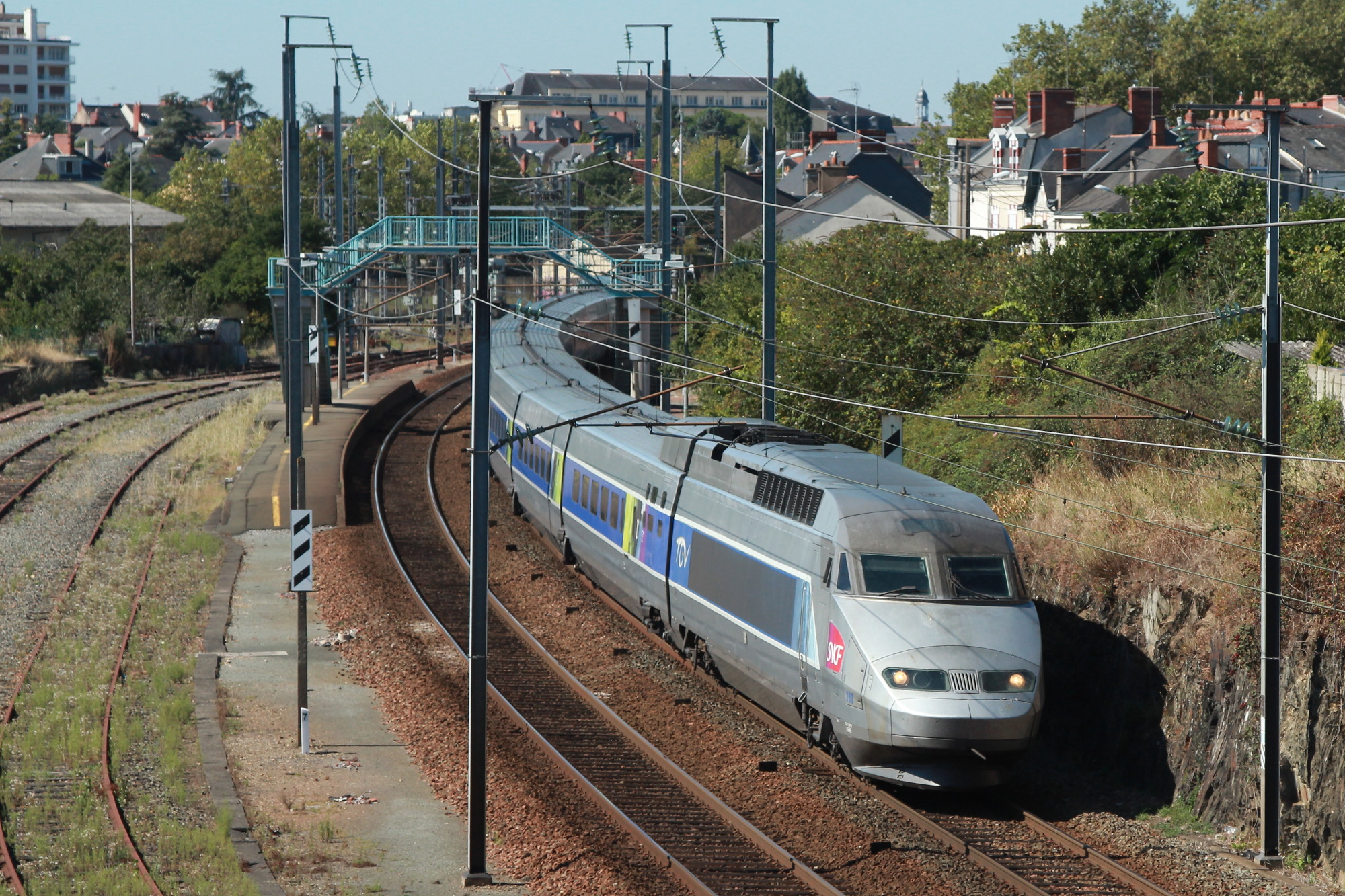 La rame TGV Atlantique n°390 franchi la gare d'Angers-Maître-École en direction de Paris.